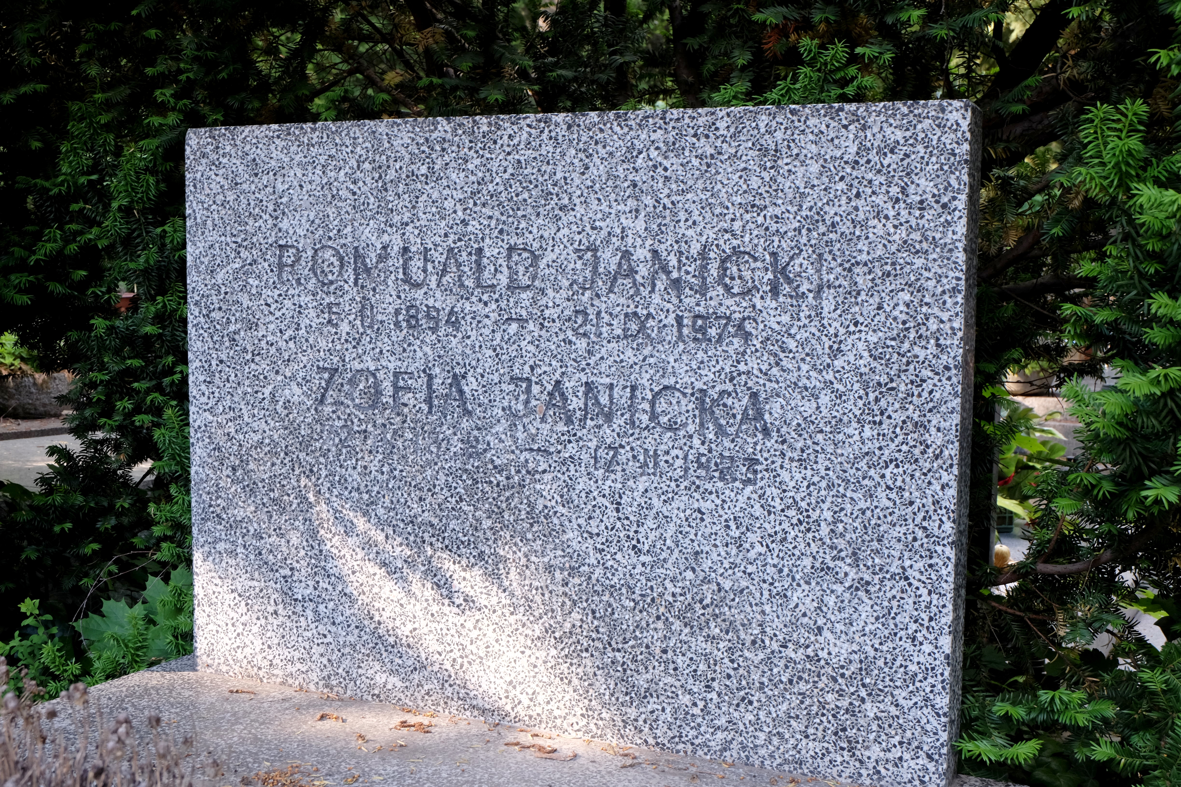 Grób działacza robotniczego Romualda Janickiego na Cmentarzu Wojskowym na Powązkach w Warszawie